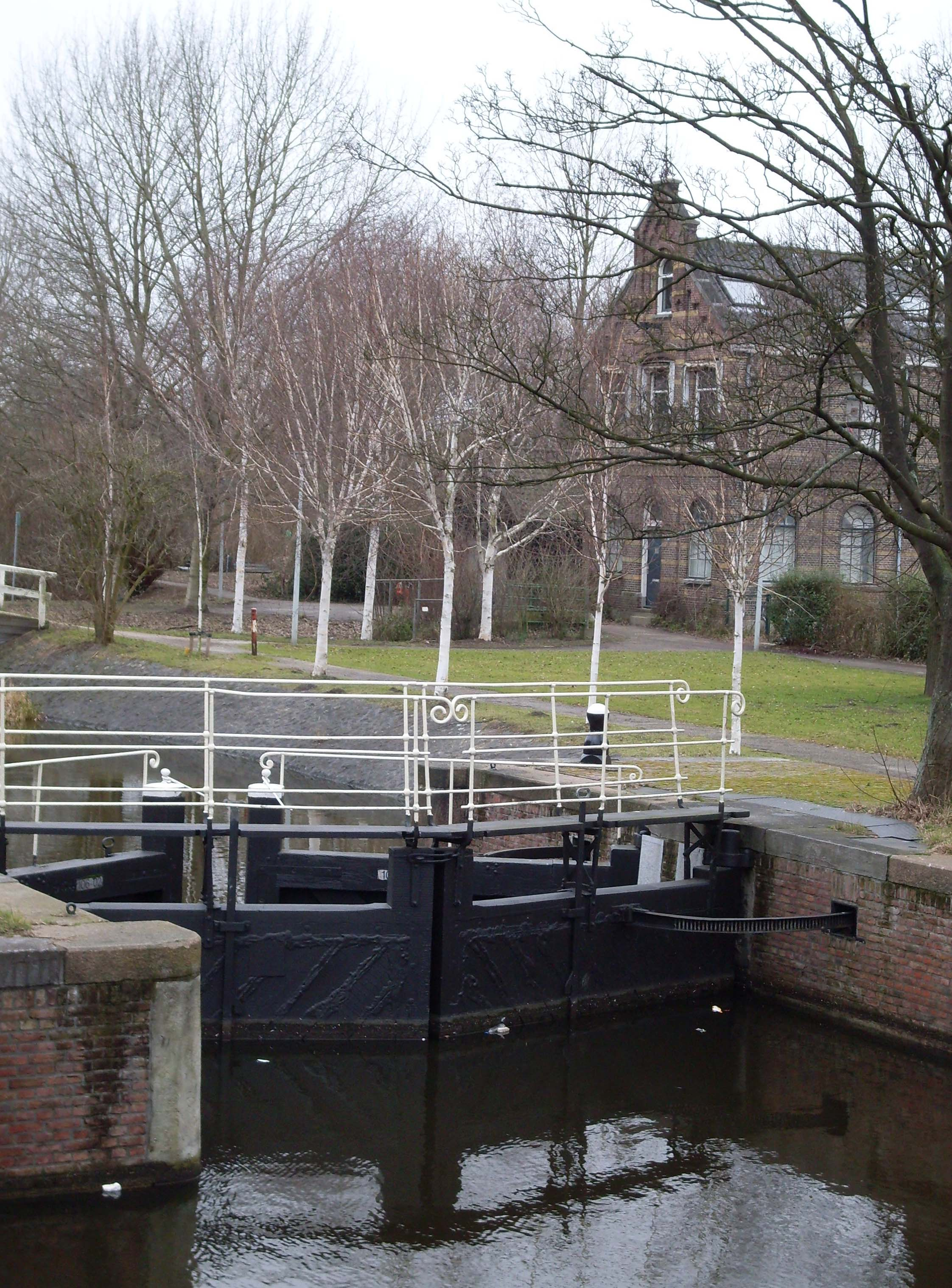 Sluis: Haarlemmerweg bij 20 te Amsterdam-West.